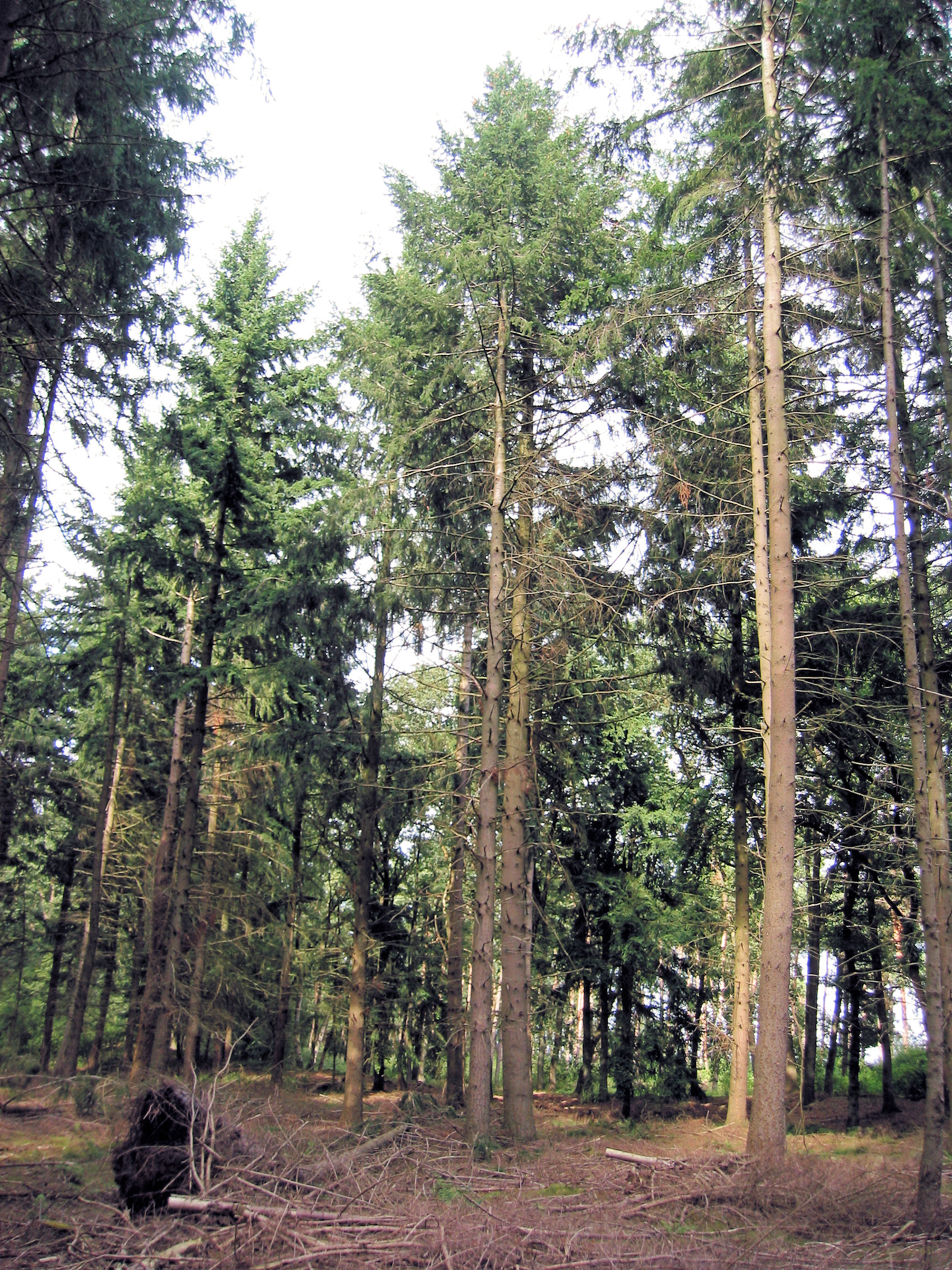 Wekeromse Zand Douglasspar (Pseudotsuga menziesii)